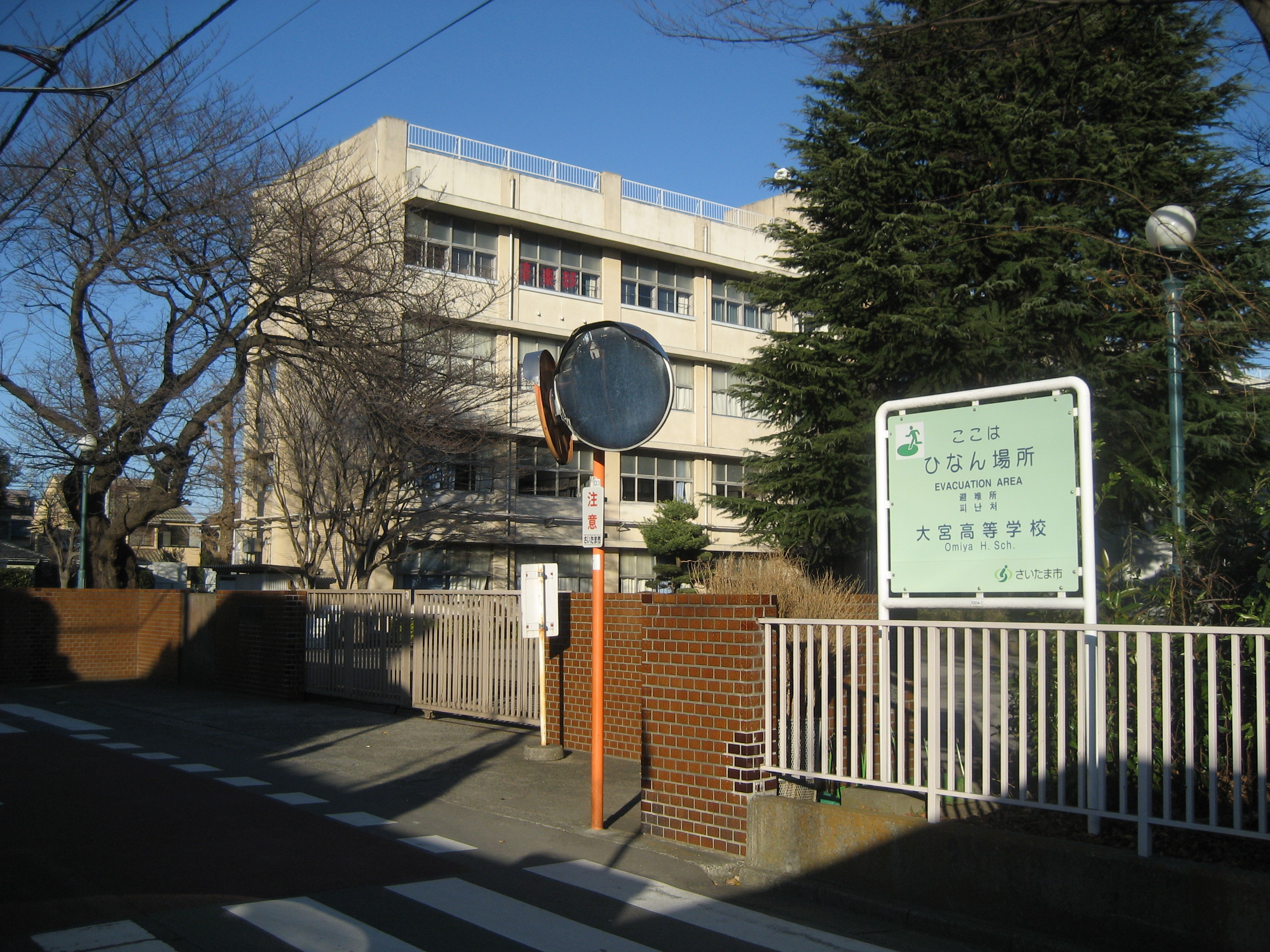 埼玉県立大宮高等学校（正門付近を撮影）